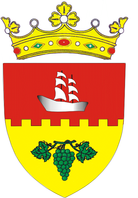 Stema Raionului Cahul